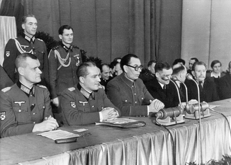 Заседание Комитета освобождения народов России в ноябре 1944 года. Стоят В. Поздняков и И. Сахаров. Третий слева - А. Власов.